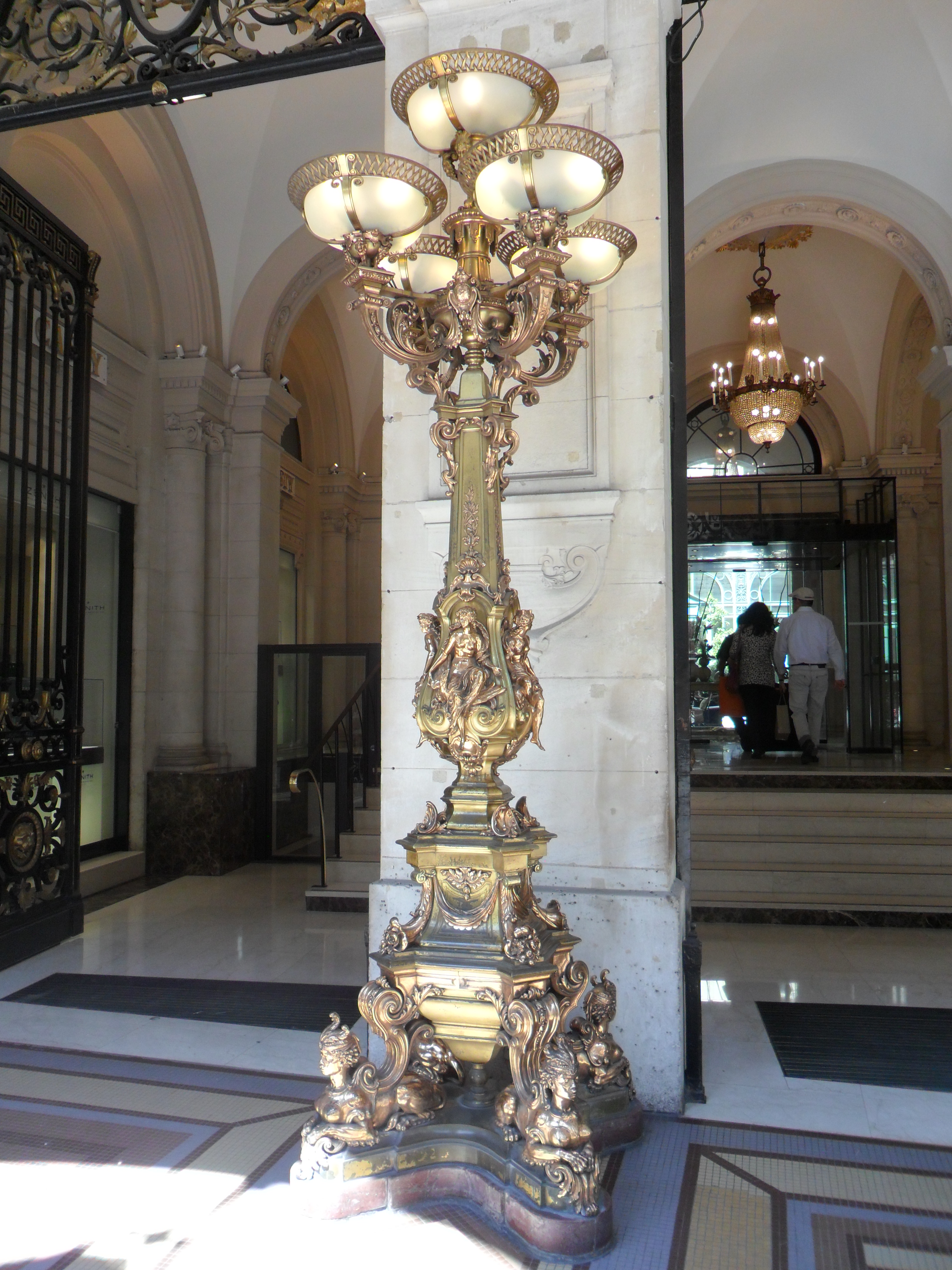 Torchère de style néo Louis-XIV Les Quatre Eléments, modèle créé par Frédéric Eugène Piat et exécuté en bronze doré par la maison De Marnyhac (vers 1878). Paire de torchères encadrant l'entrée du Westin Hotel Paris-Vendôme, rue de Castiglione, Paris.